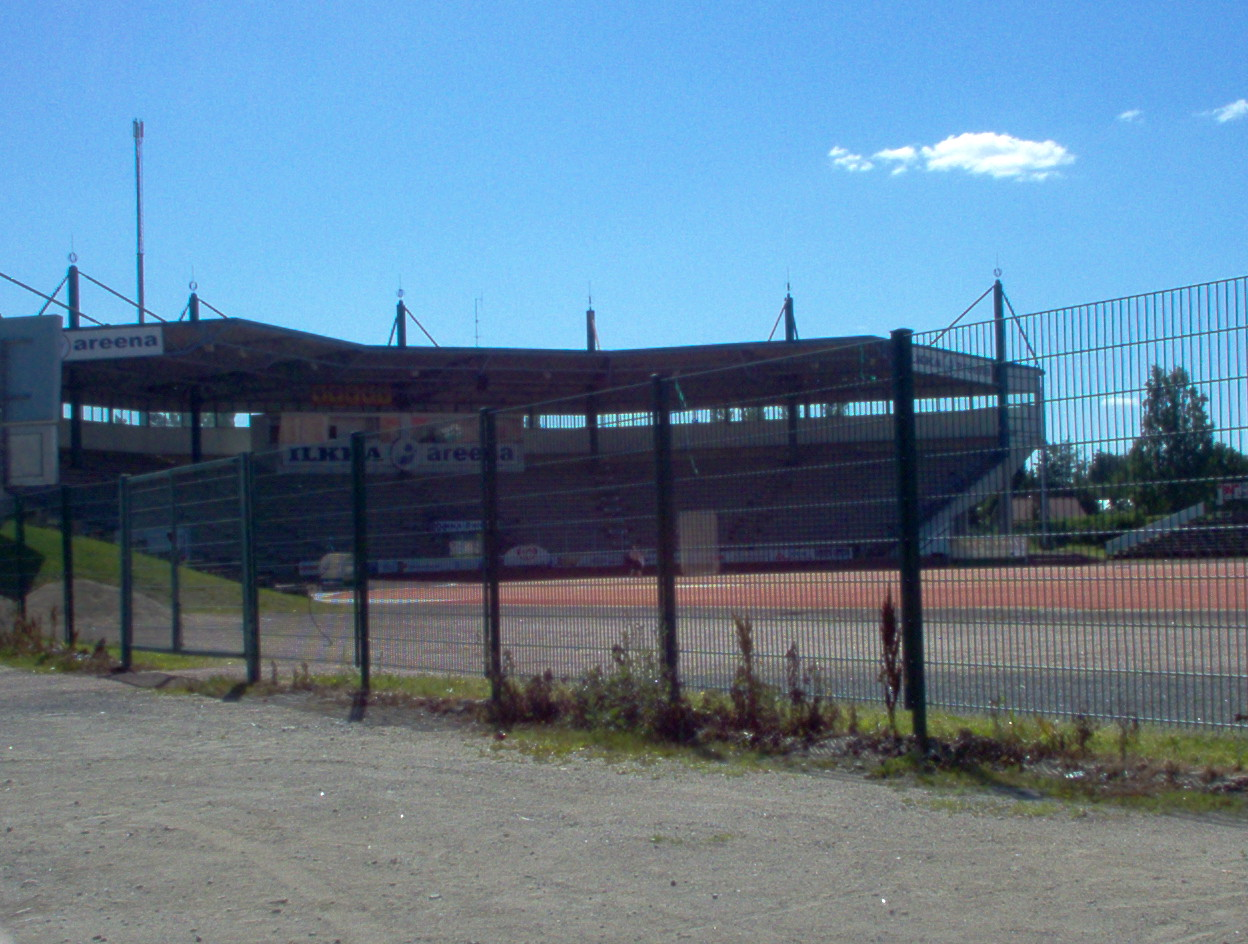 Ilkka-areena